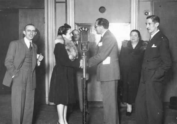 Tacholas, Maruxa Boga, Castelao, Alfredo Aróstegui, Enrique González. Recordando a Galicia